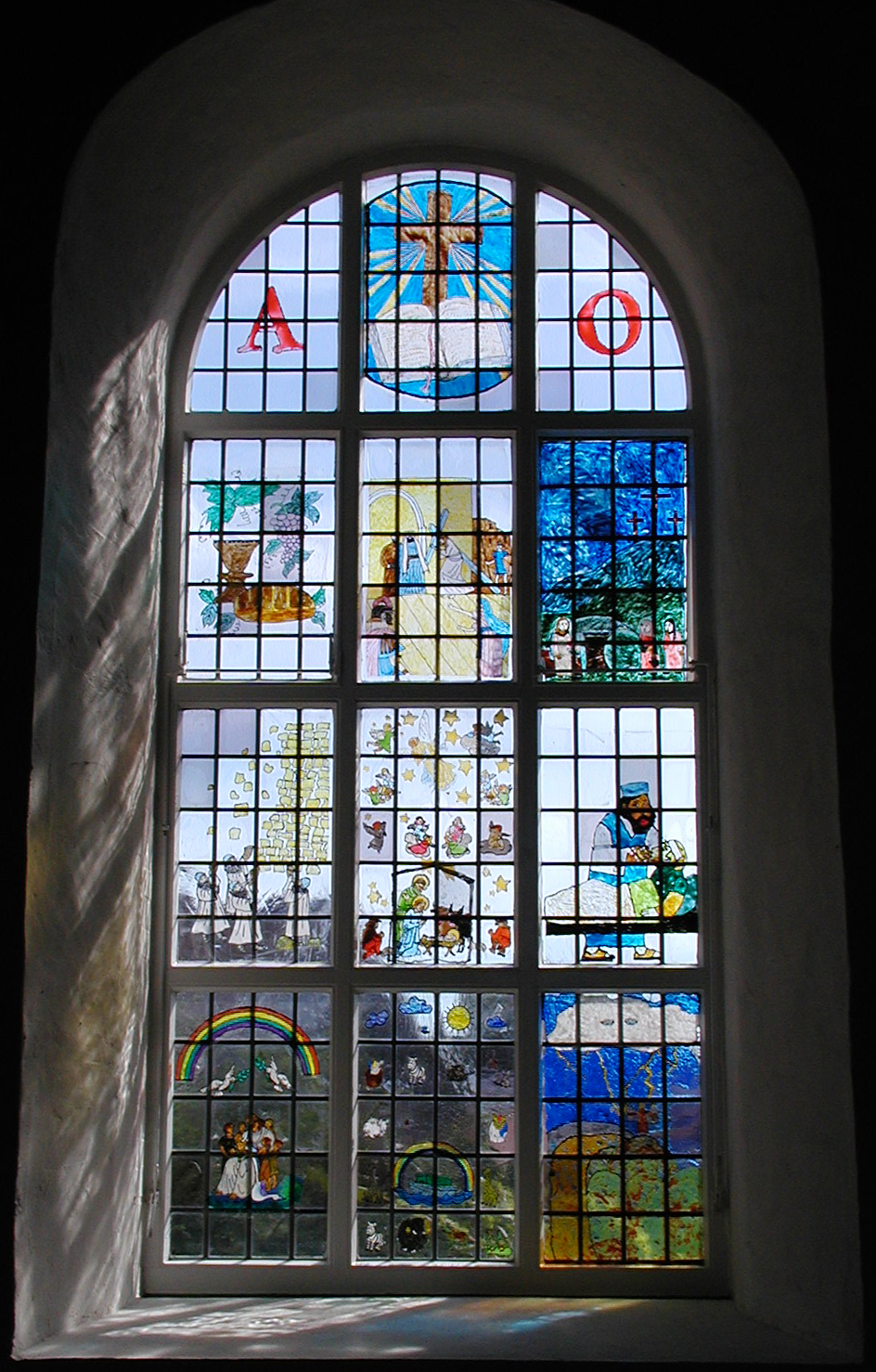 Das Selbgestalltete Fenster in der Kirche